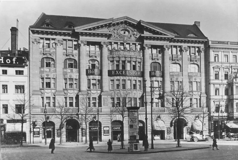 Berlin, Hotel Excelsior am Anhalter Bahnhof 1924 s/w 18x24 quer